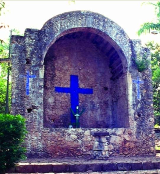 Cruz Parlante reconstruida, Felipe Carrillo Puerto, Quintana Roo, México